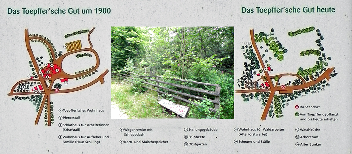 Infotafel (Ausschnitt bearbeitet) Töpffersches Gut 1900/2010 in Lopau, Lüneburger Heide, Germany.